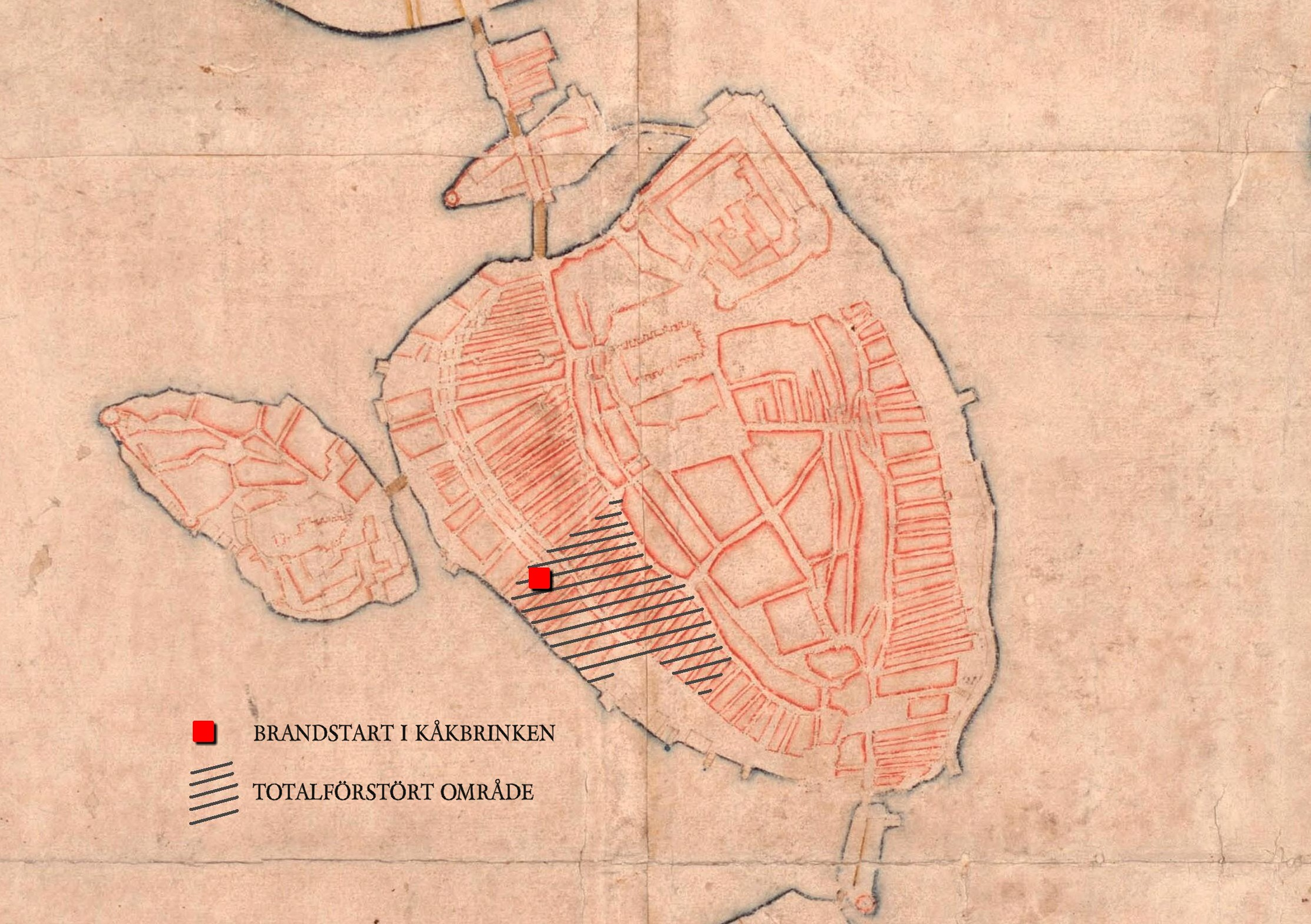 Brandområde för "Stora vådelden 1625", rekonstruktion på karta från tiden